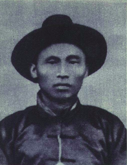 1952年林祥谦